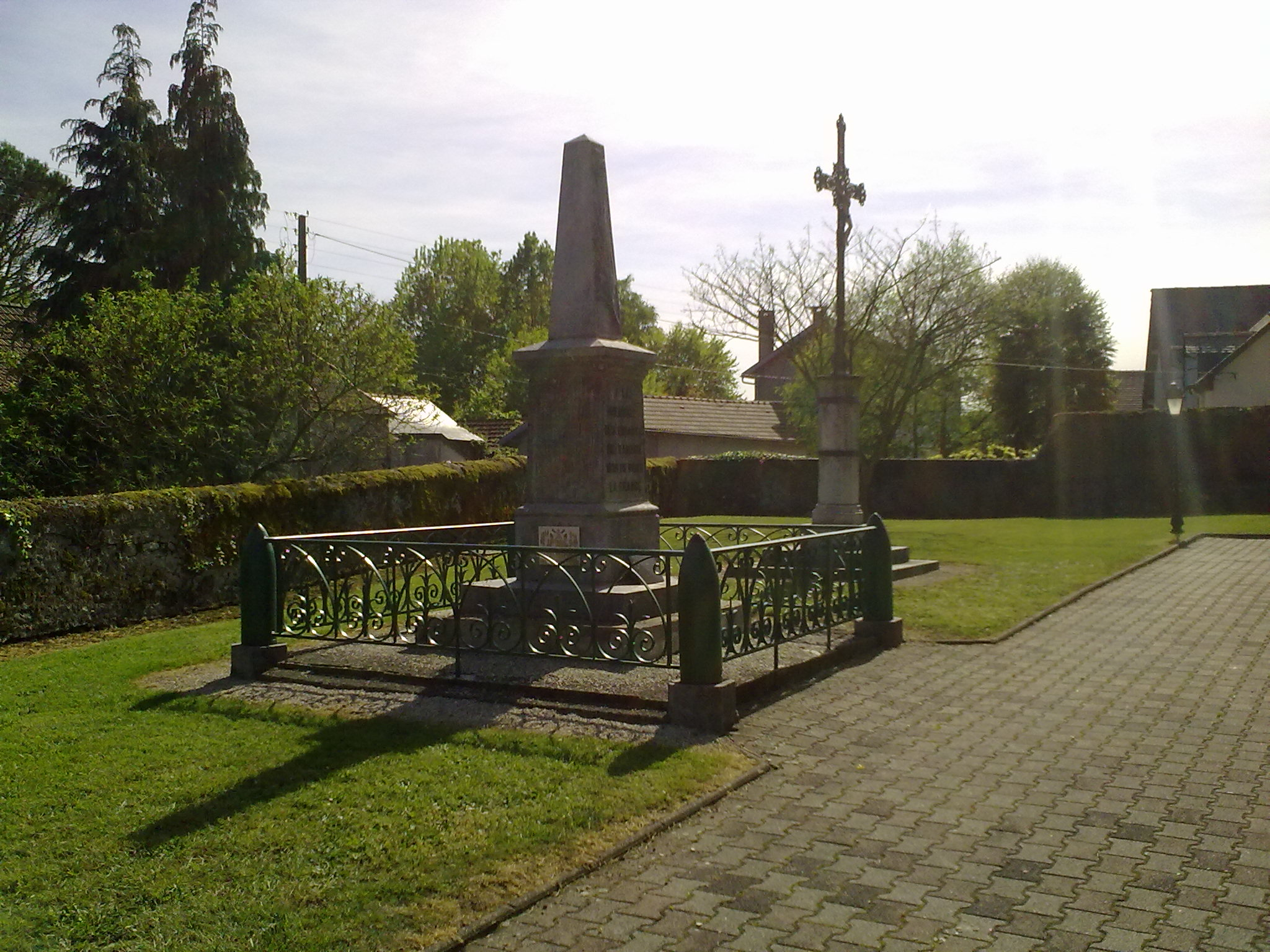 Barzun, France